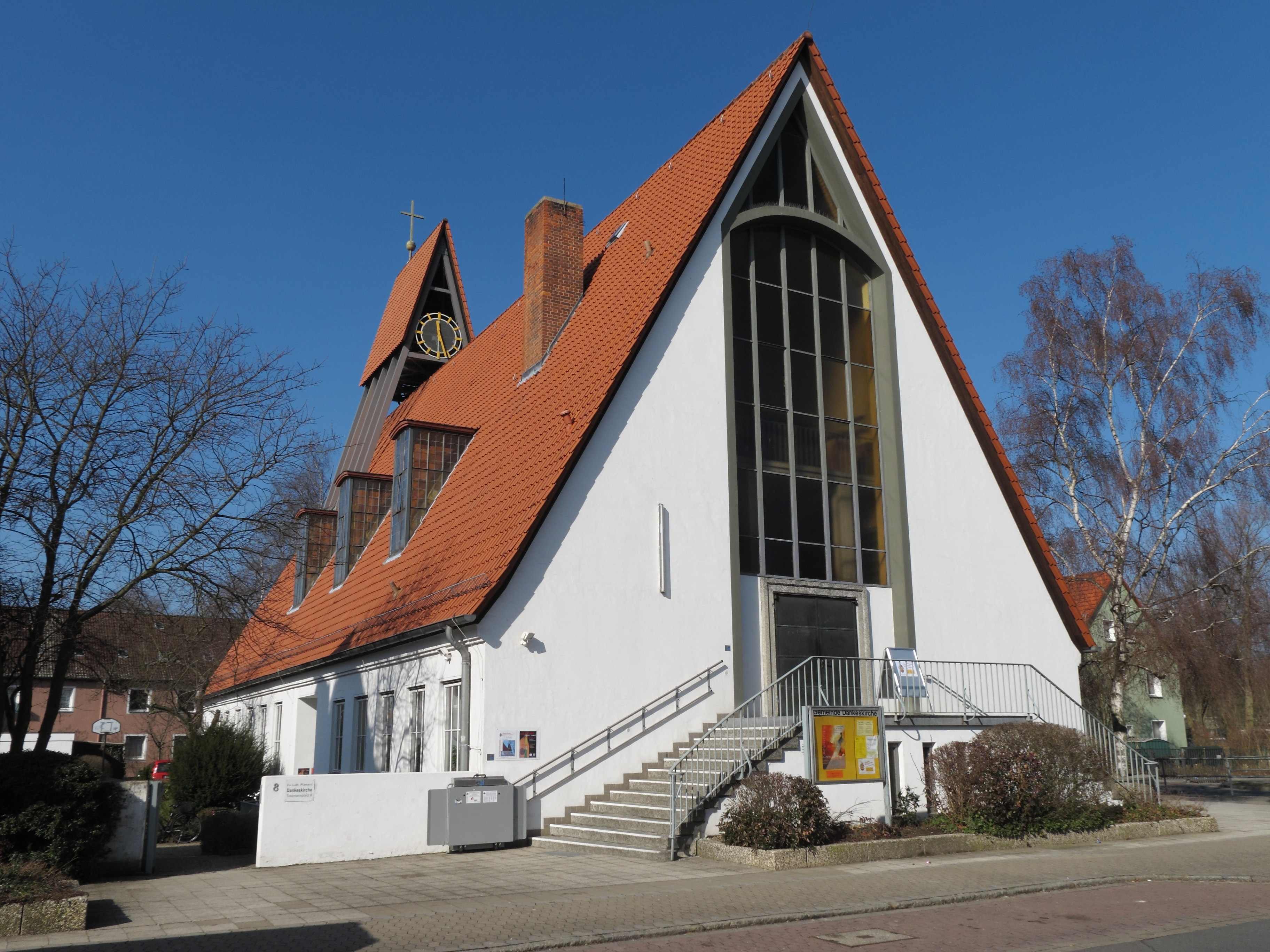 Dankeskirche Braunschweig, Schuntersiedlung, Baujahr 1954